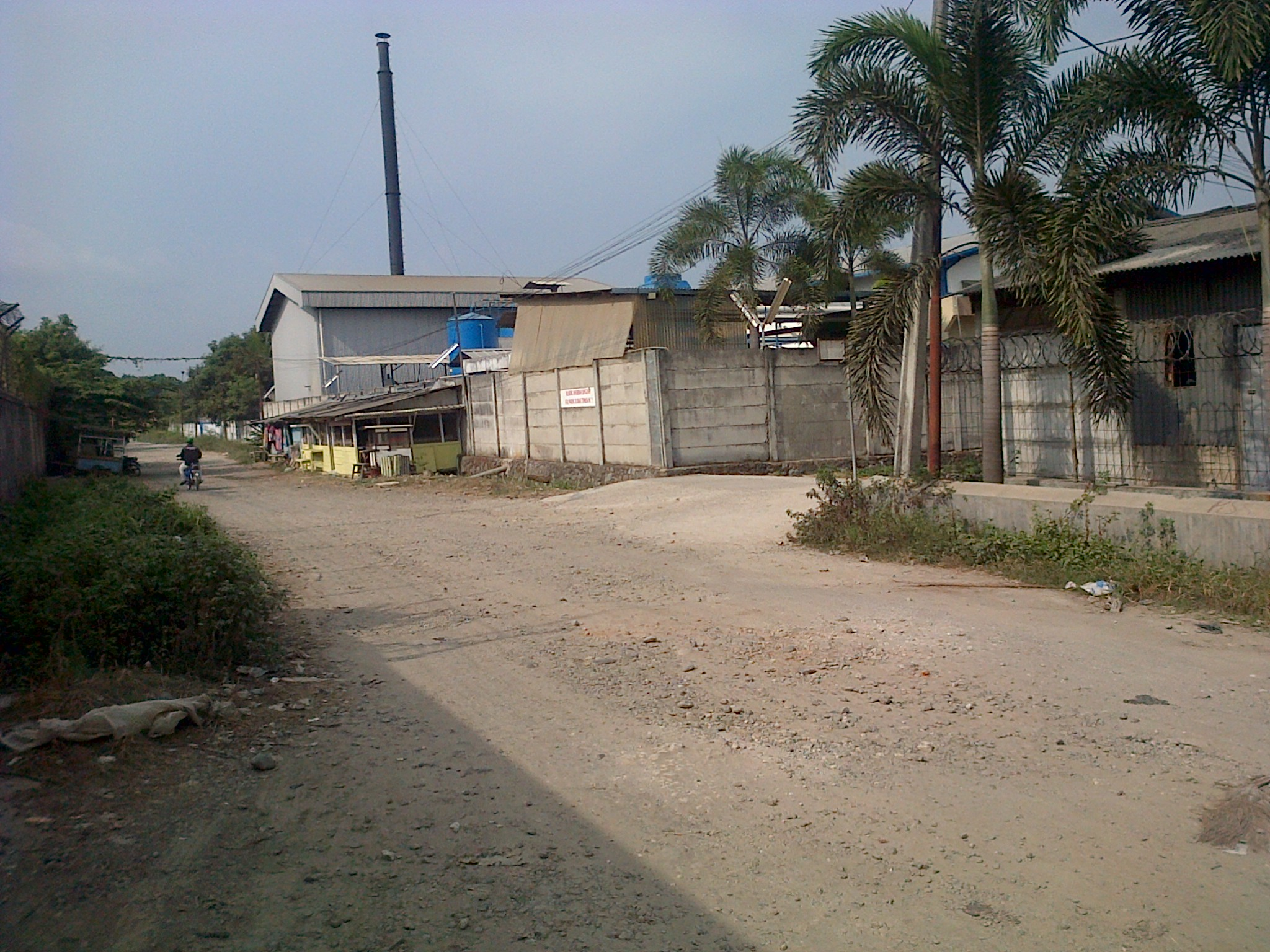 Kawasan Industri Jatake Blok AE